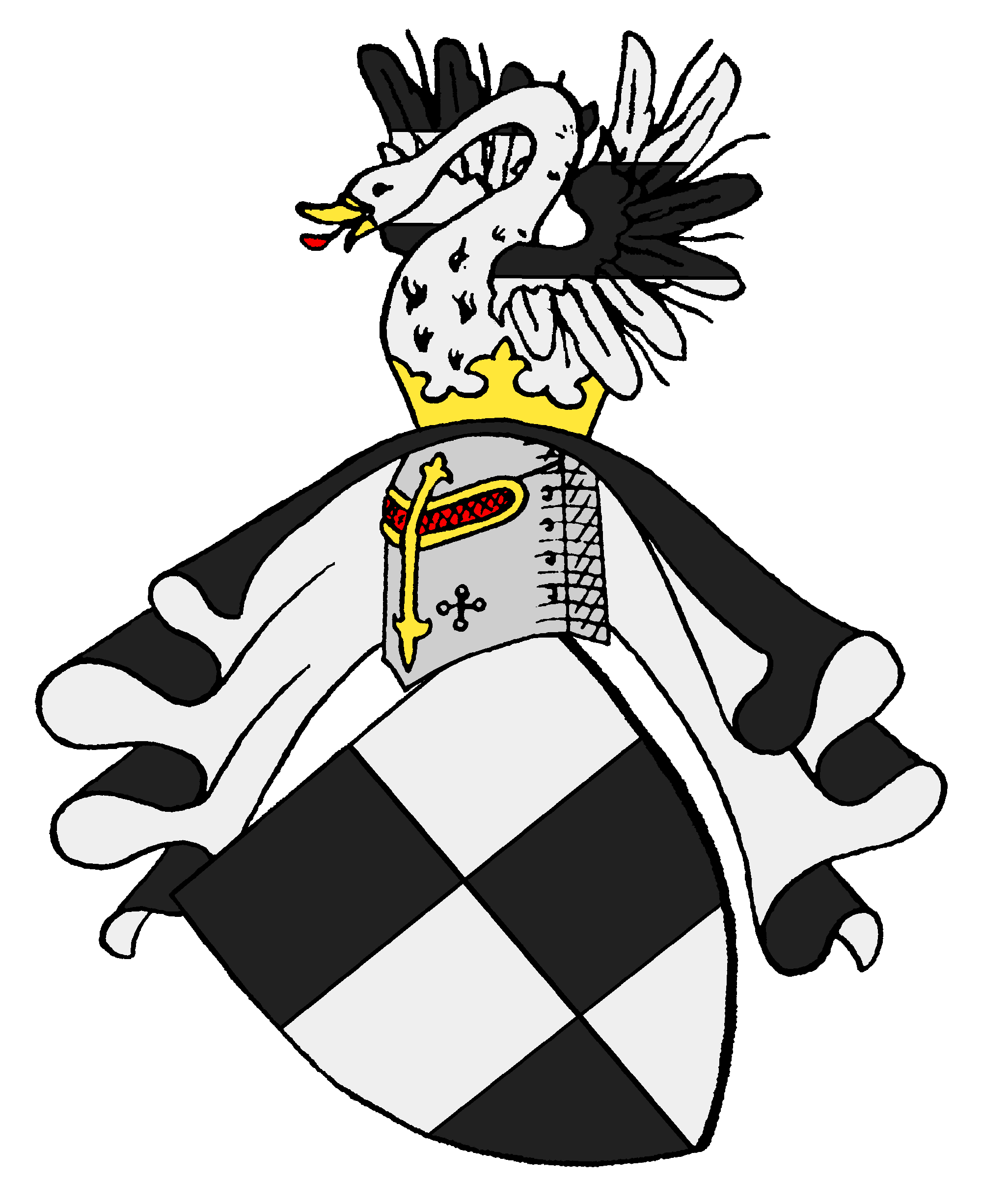 Wappen derer von Westerholt